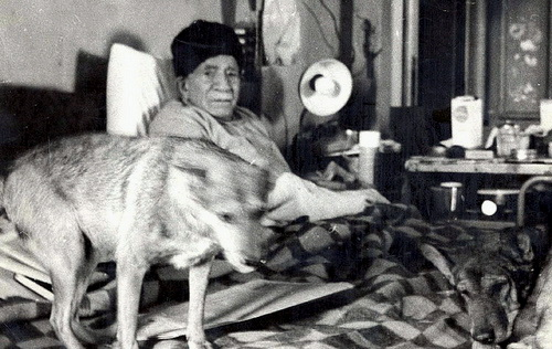 الرئيس المصري محمد نجيب في غرفته في فيلا زينب الوكيل